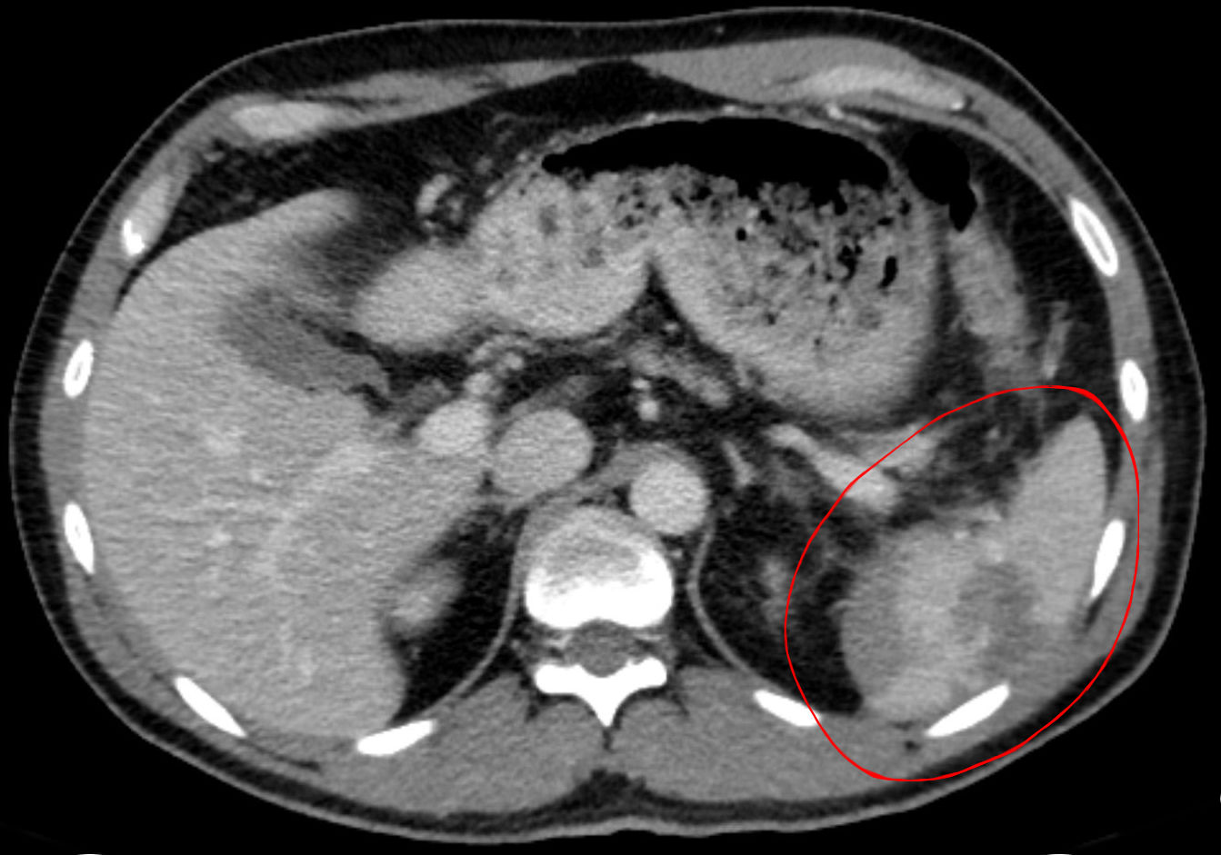 Traumatische Milzruptur in der Computertomographie, axial. Portalvenöse Kontrastmittelphase. Hypodense Irregularität im unteren Anteil der Milz als Korrelat des Parenchymrisses. Bandförmiger Saum am Unterrand als Zeichen von freier Flüssigkeit / Blut.